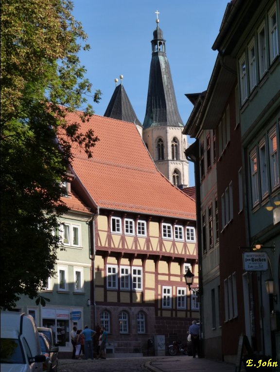 99734 Nordhausen, Barfüßerstraße, Blick zur Flohburg und St.Blasii-Kirche